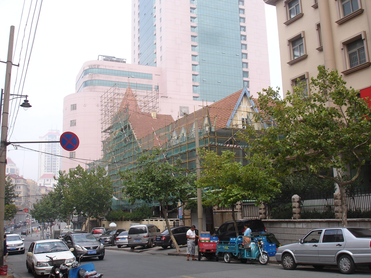 青岛水师饭店旧址整修中